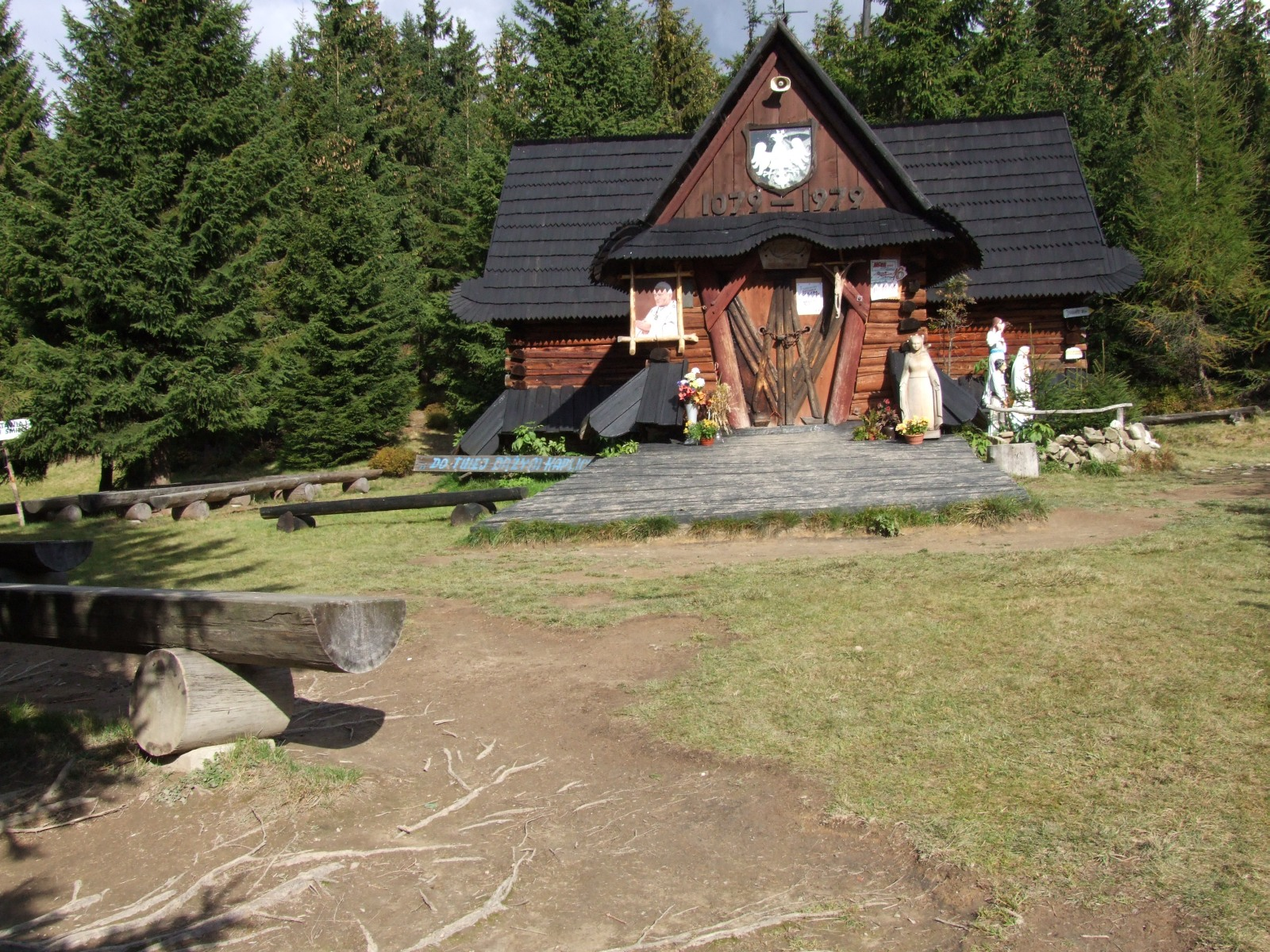 Kaplica Papieska na Rusnakowej Polanie pod Turbaczem